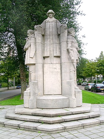 Juliana van Stolberg, monument in Den Haag, voorkant